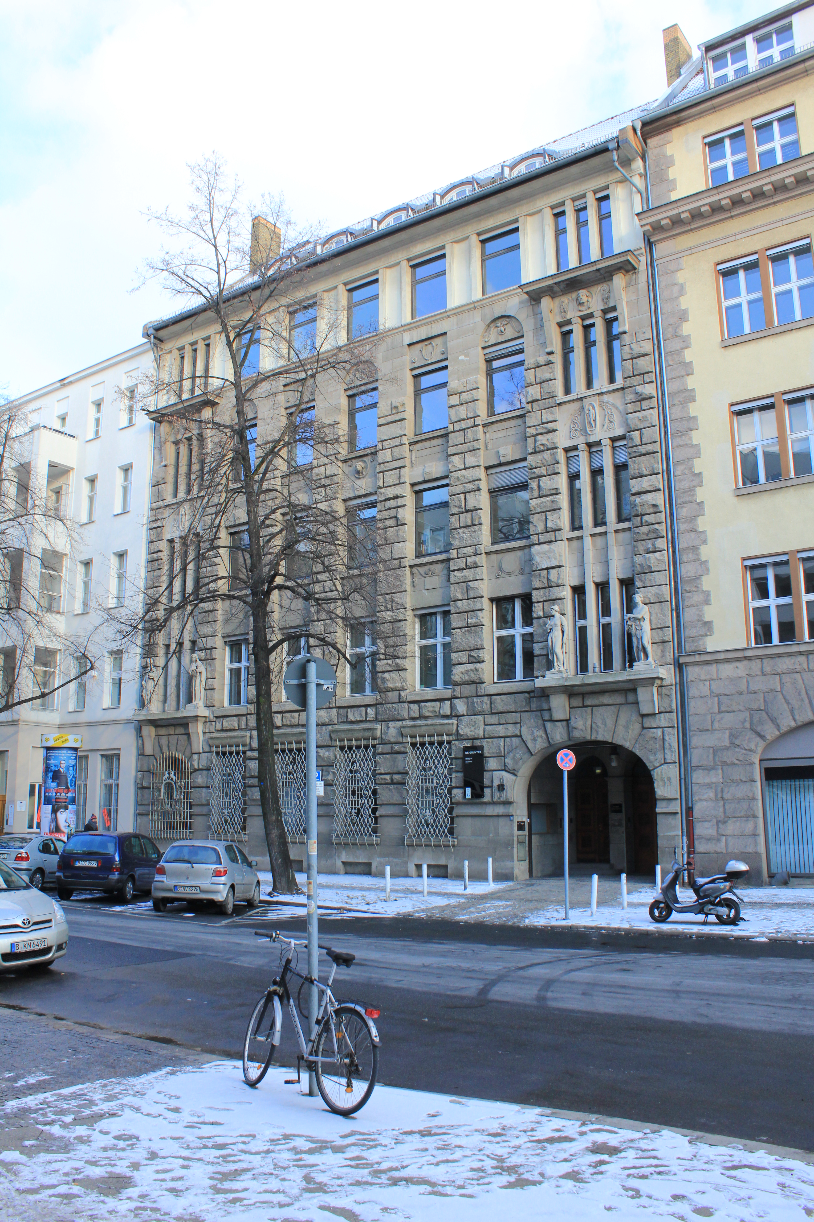 Verlagshaus Walter de Gruyter 1910-11 von Otto Walter